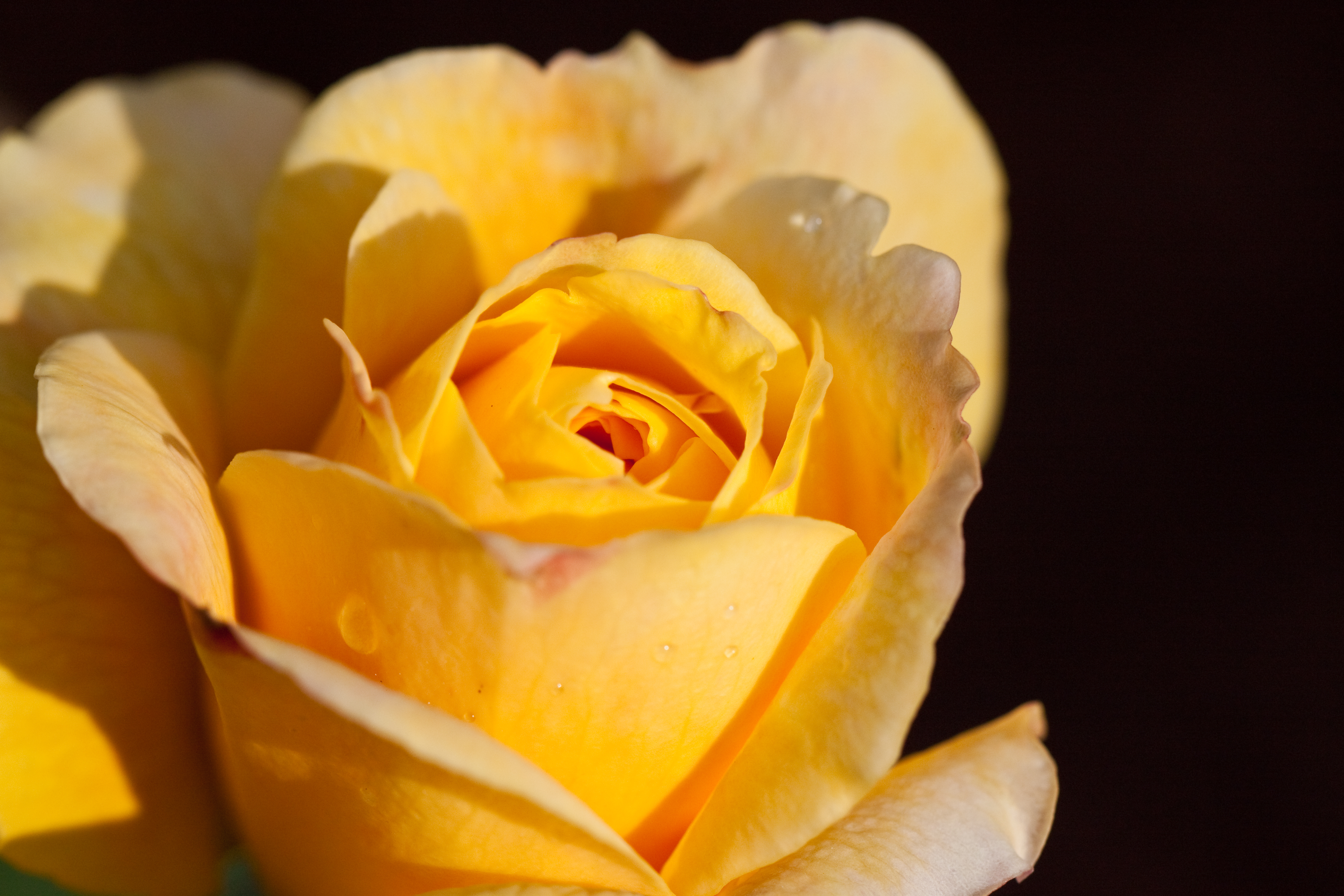 King's Ronsom. キングス・ランサム。